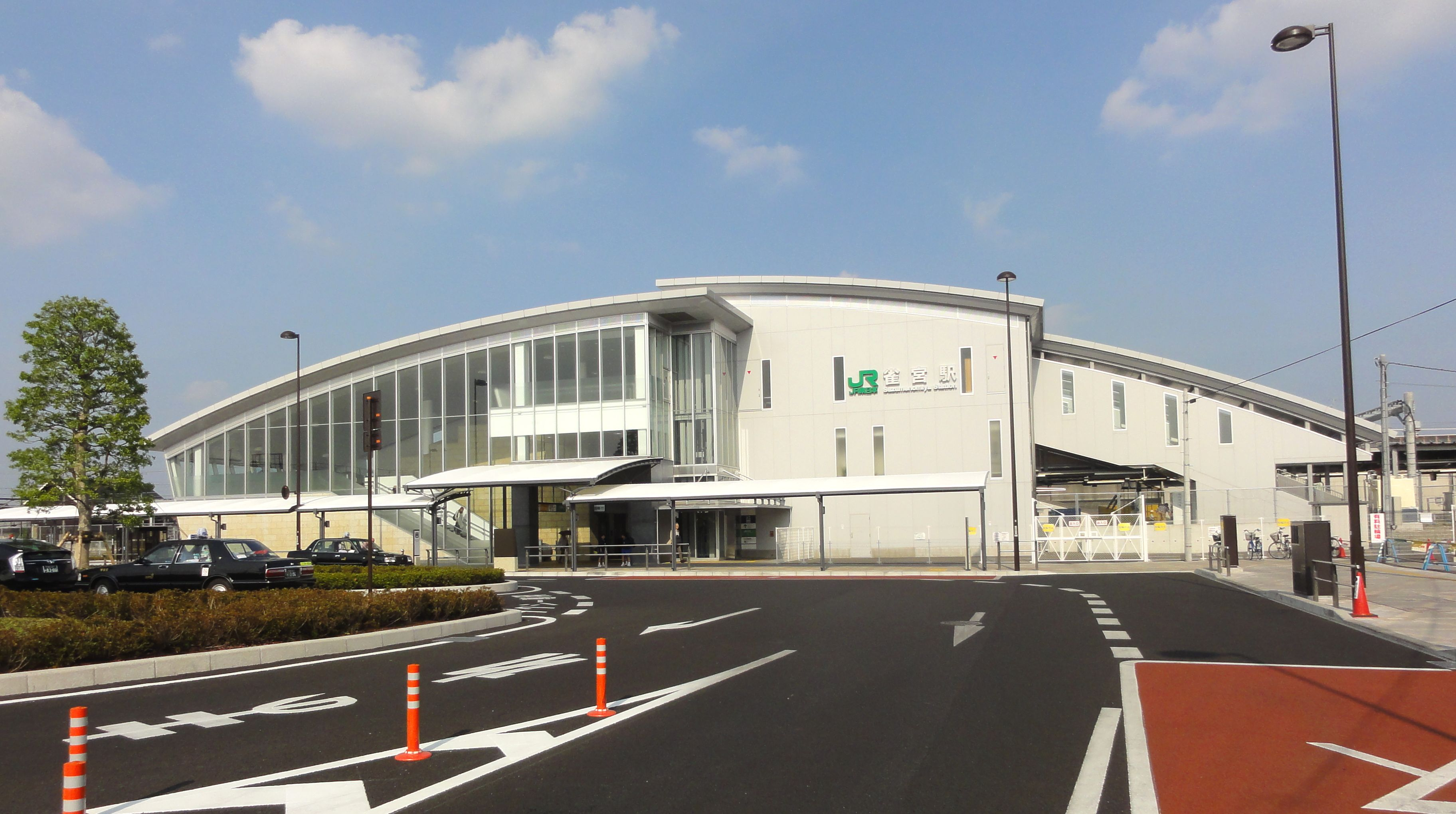 雀宮駅